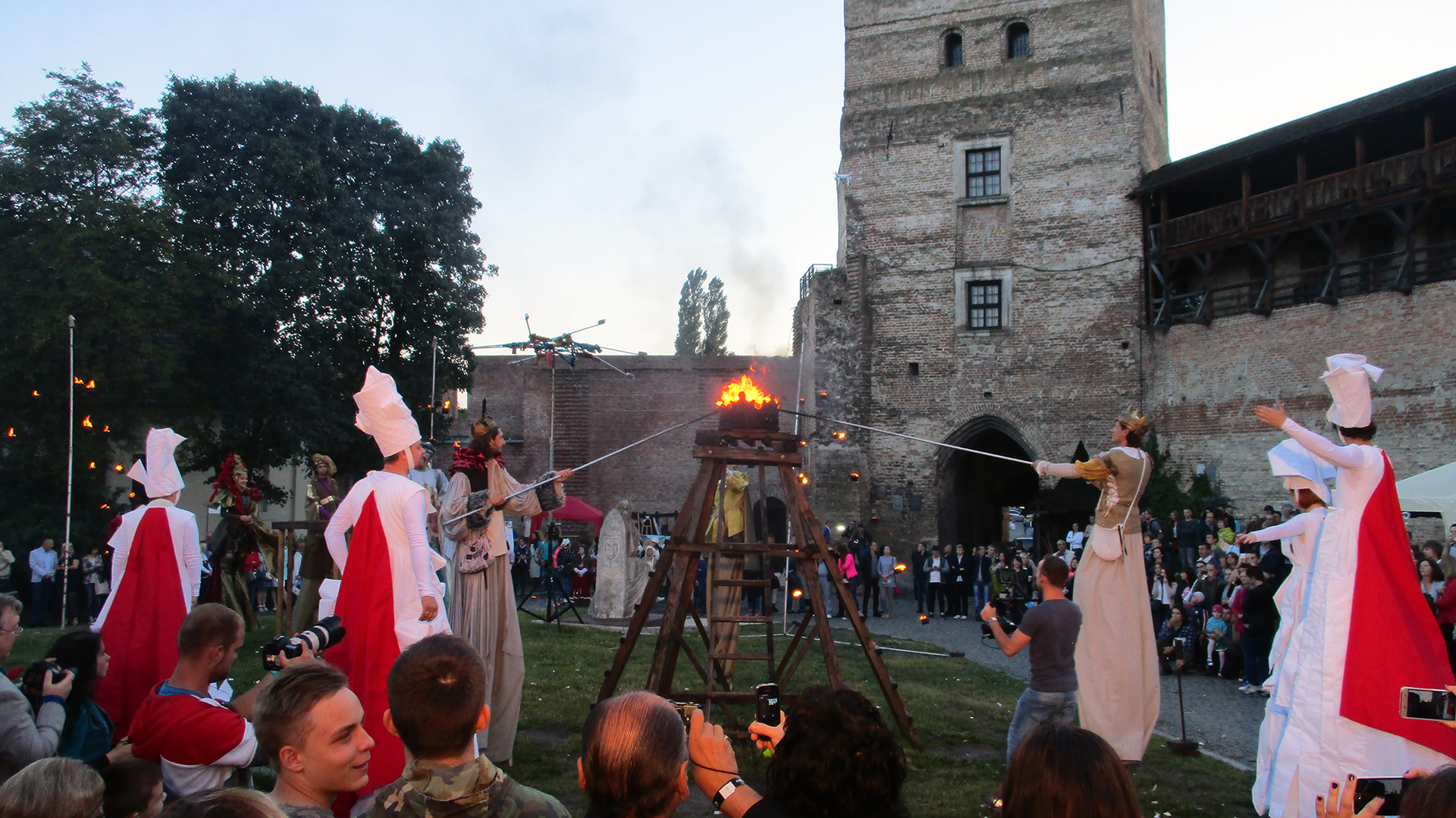 Відкриття арт-шоу "Ніч у Луцькому замку -2017"